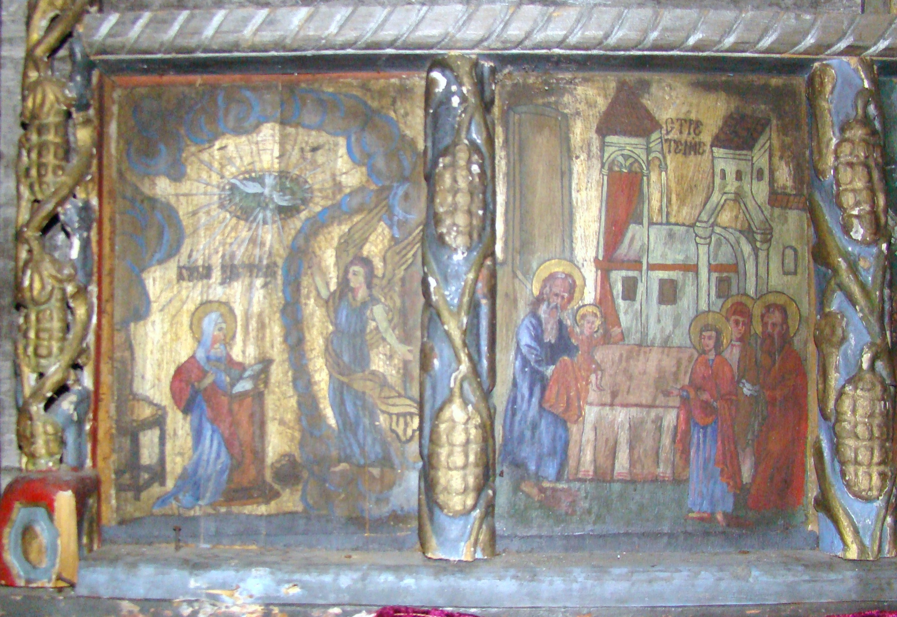 Biserica de lemn „Înălţarea Sfintei Cruci" din Pruneni